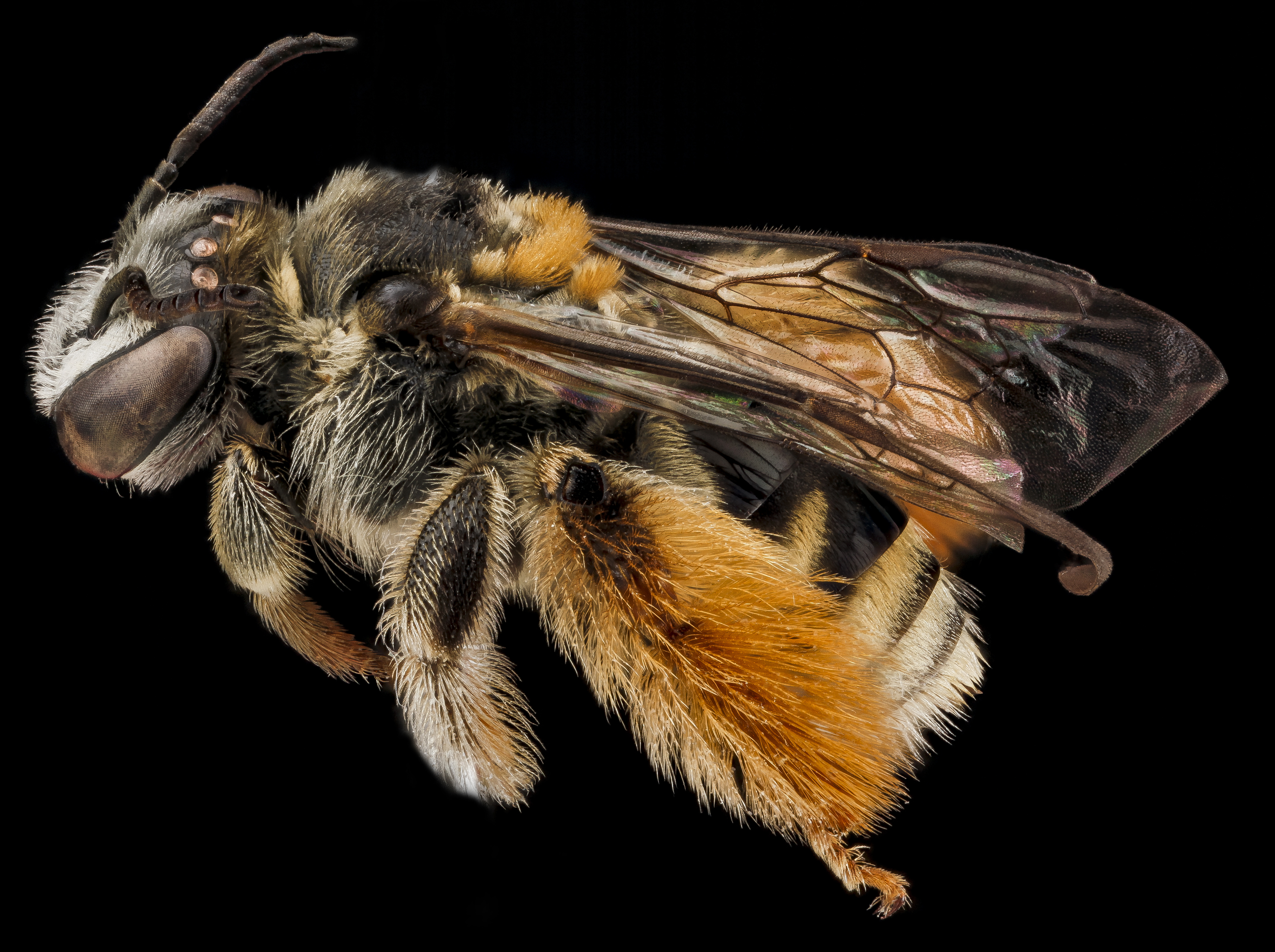 Exomalopsis similis, female, Cuba, GTMO, Guantanamo Bay